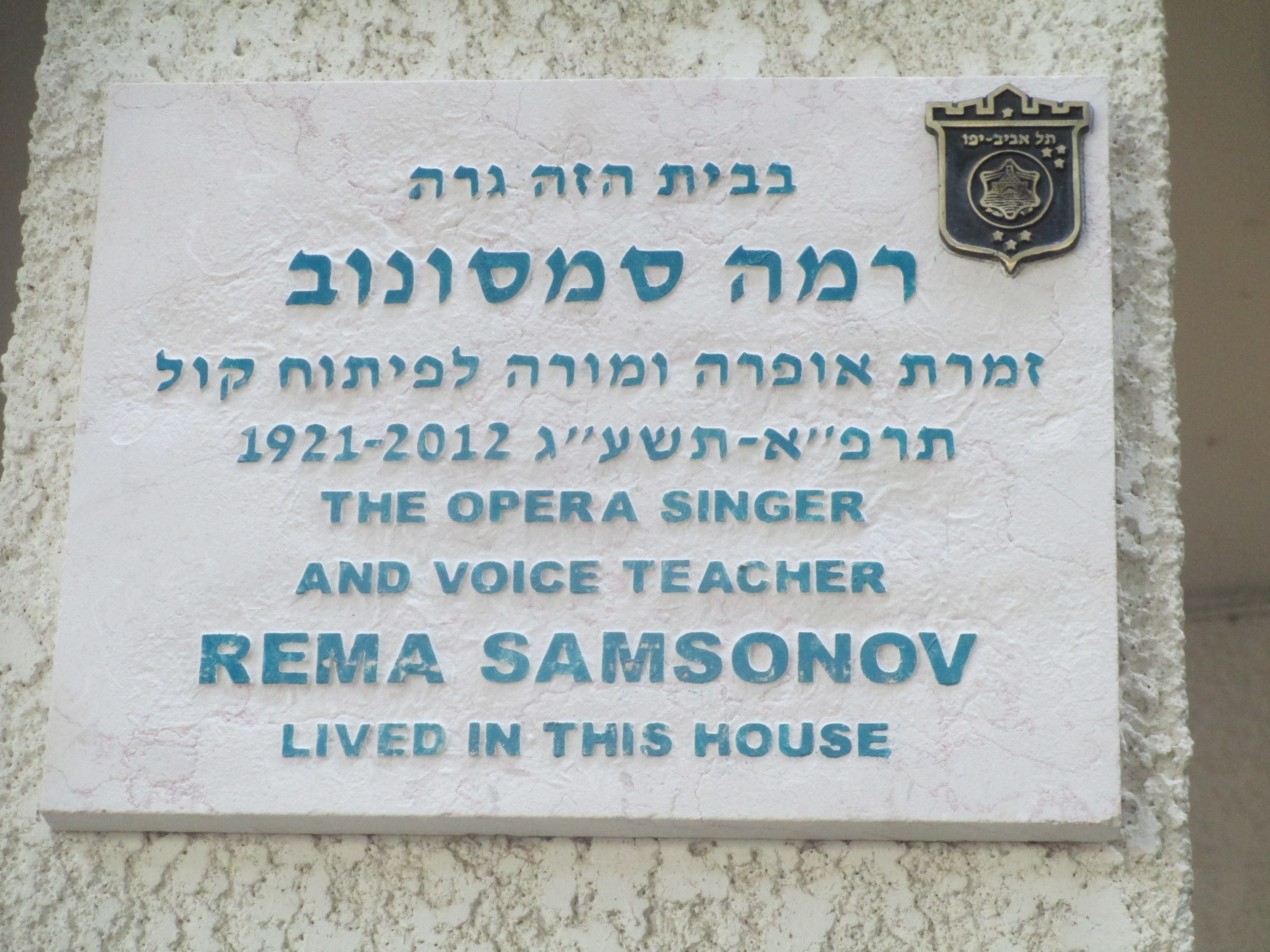 לוחית זיכרון לרמה סמסונוב בכניסה לביתה בשדרות ח"ן 36 בתל אביב